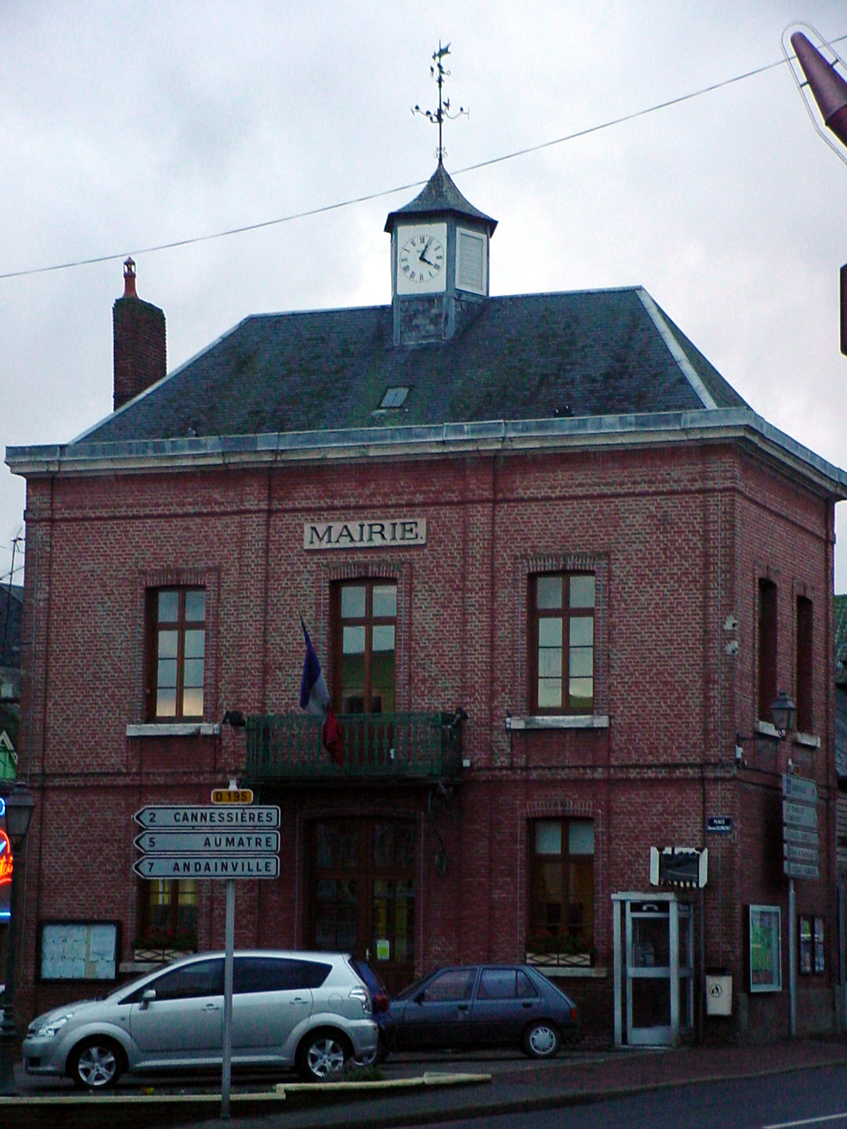 Oisemont (Somme, France) - La mairie. . .